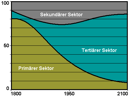 Entwicklung der drei Wirtschaftssektoren nach Fourastié (Berechnung für Frankreich)